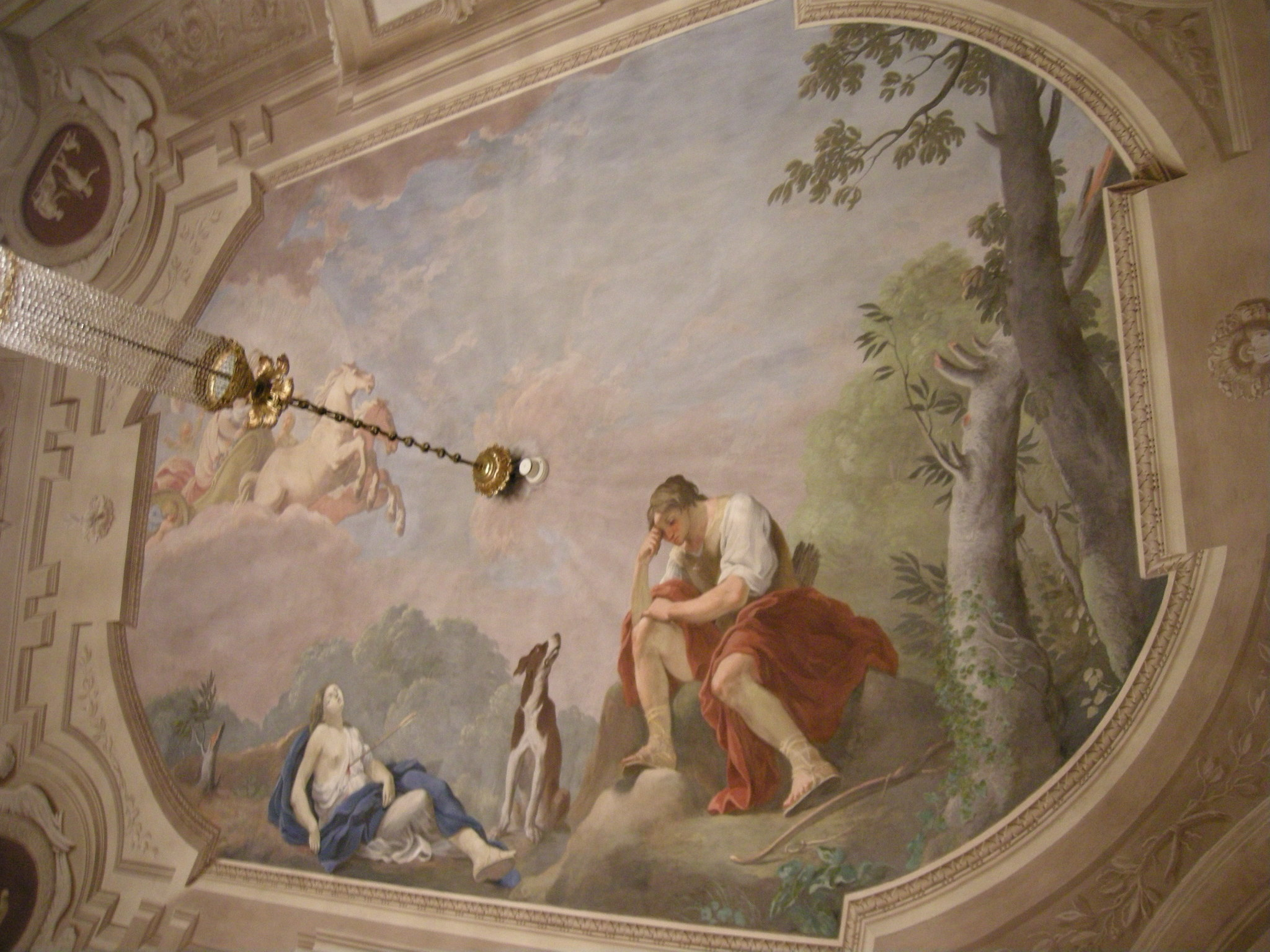 Sala di cefalo, affreschi di Giuseppe Antonio Fabbrini e Tommaso Gherardini